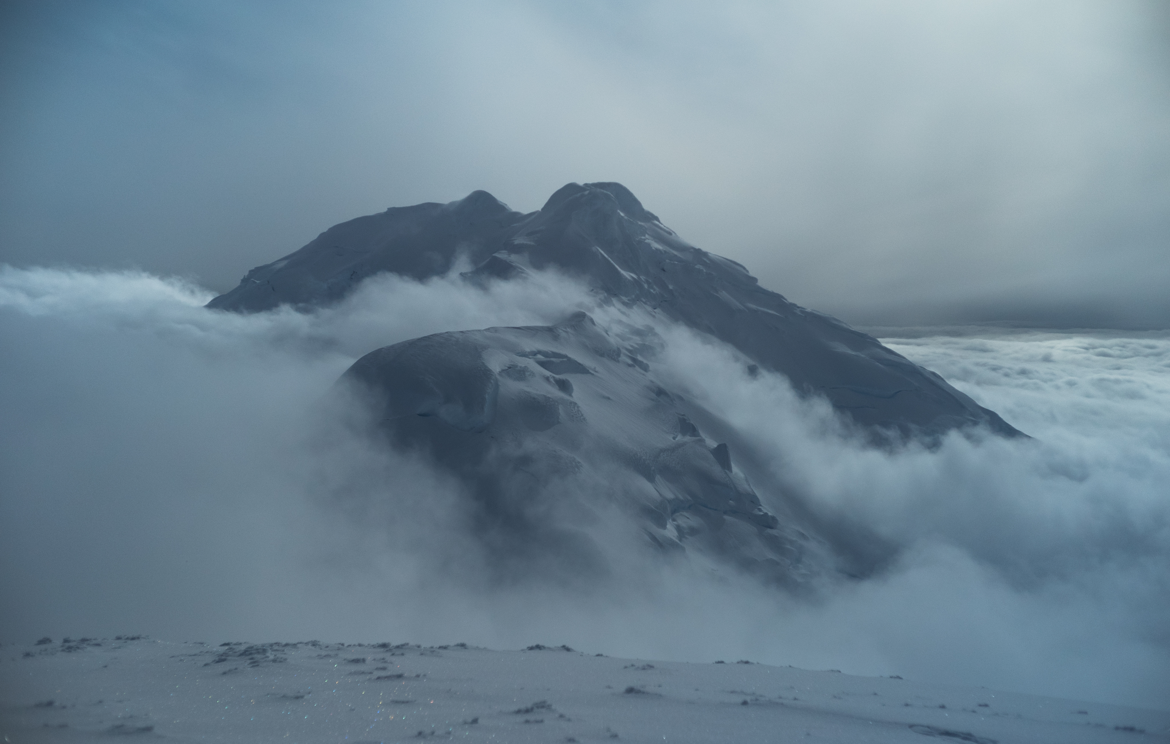 Връх Фризланд и връх Св. Борис, снимка от връх Лясковец